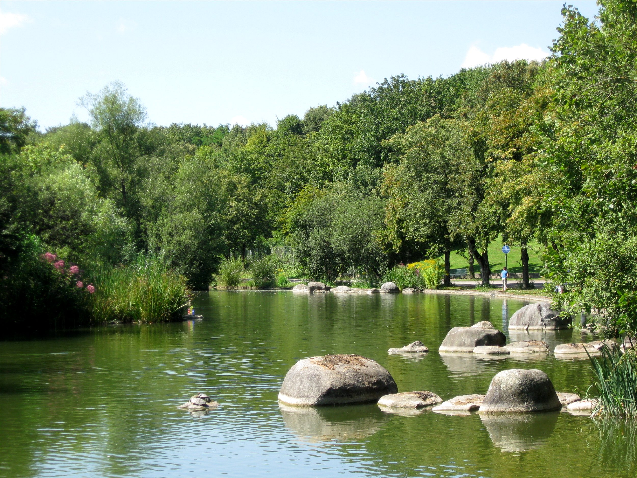 Mollsee im Westpark in München (Der östliche der beiden Seen im Westpark)